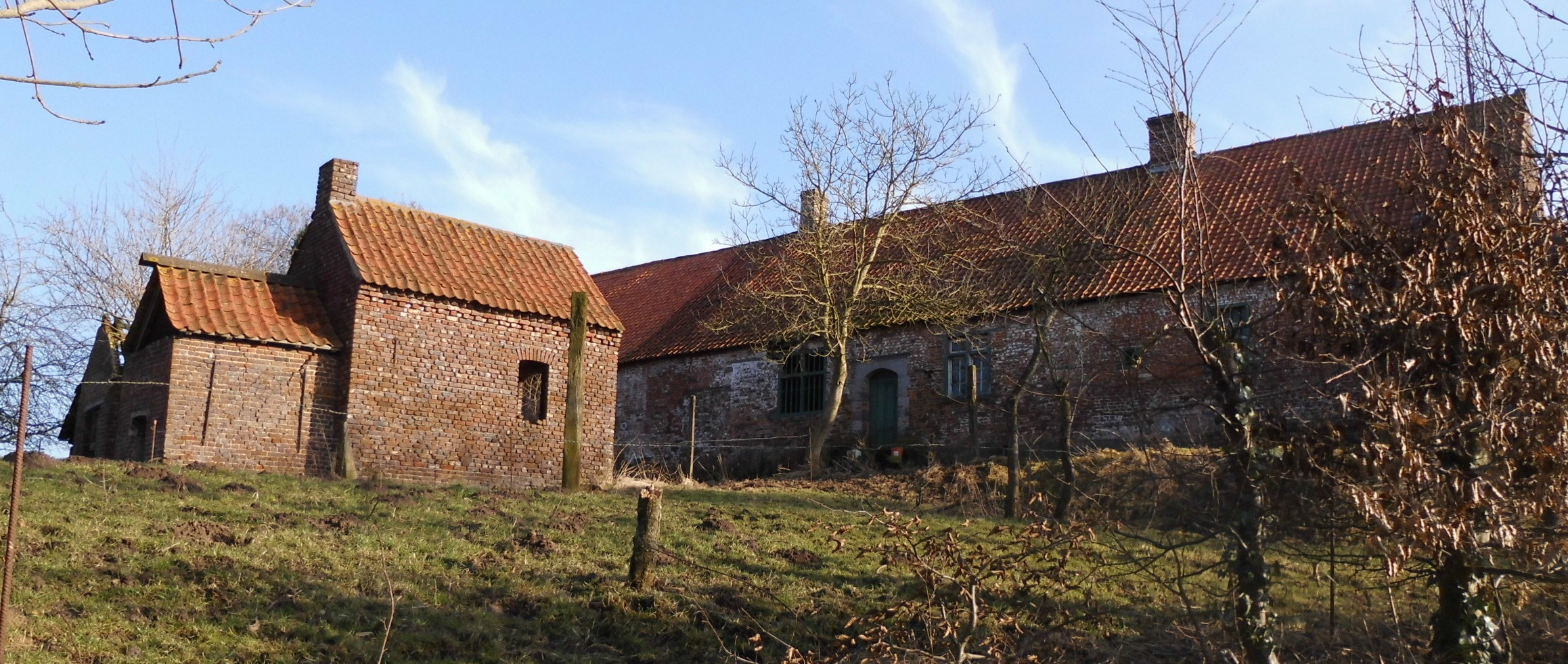 Bakhuis van de Abdijhoeve Hof te Weylegem - Wijlegem - Sint-Denijs-Boekel - Zwalm - Oost-Vlaanderen - België